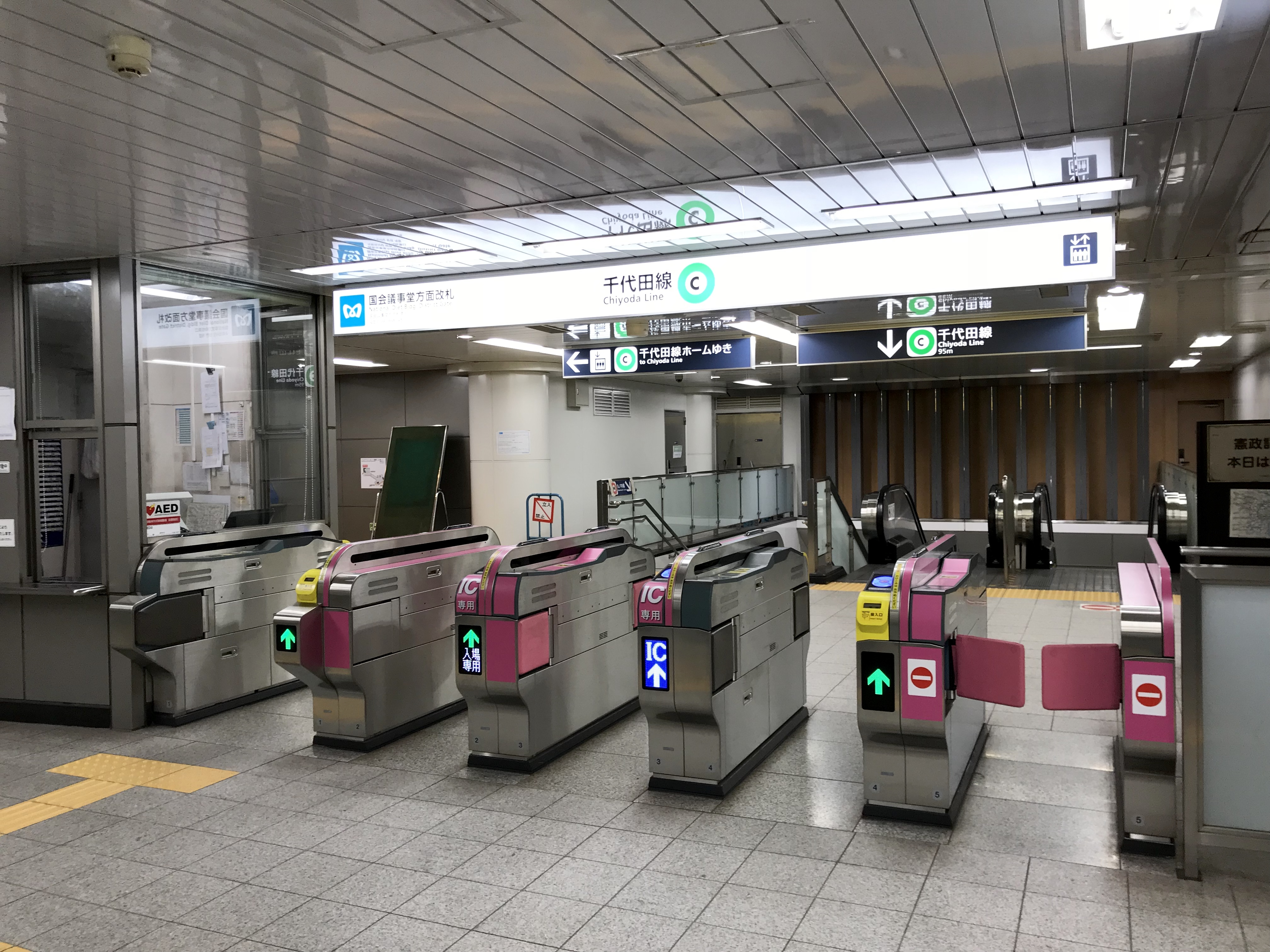 東京メトロ千代田線国会議事堂方面改札口